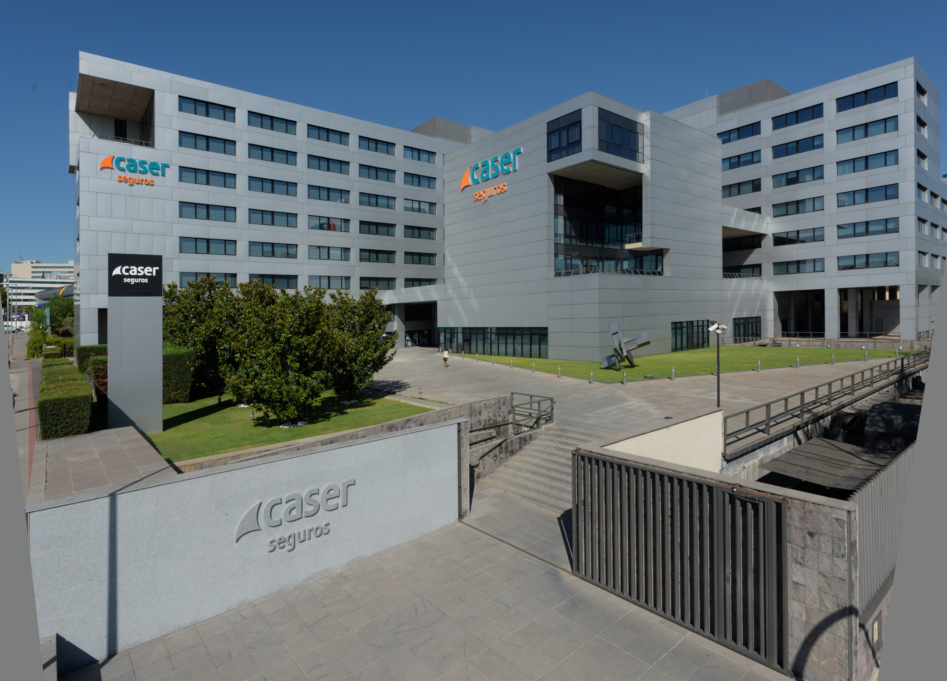 Sede